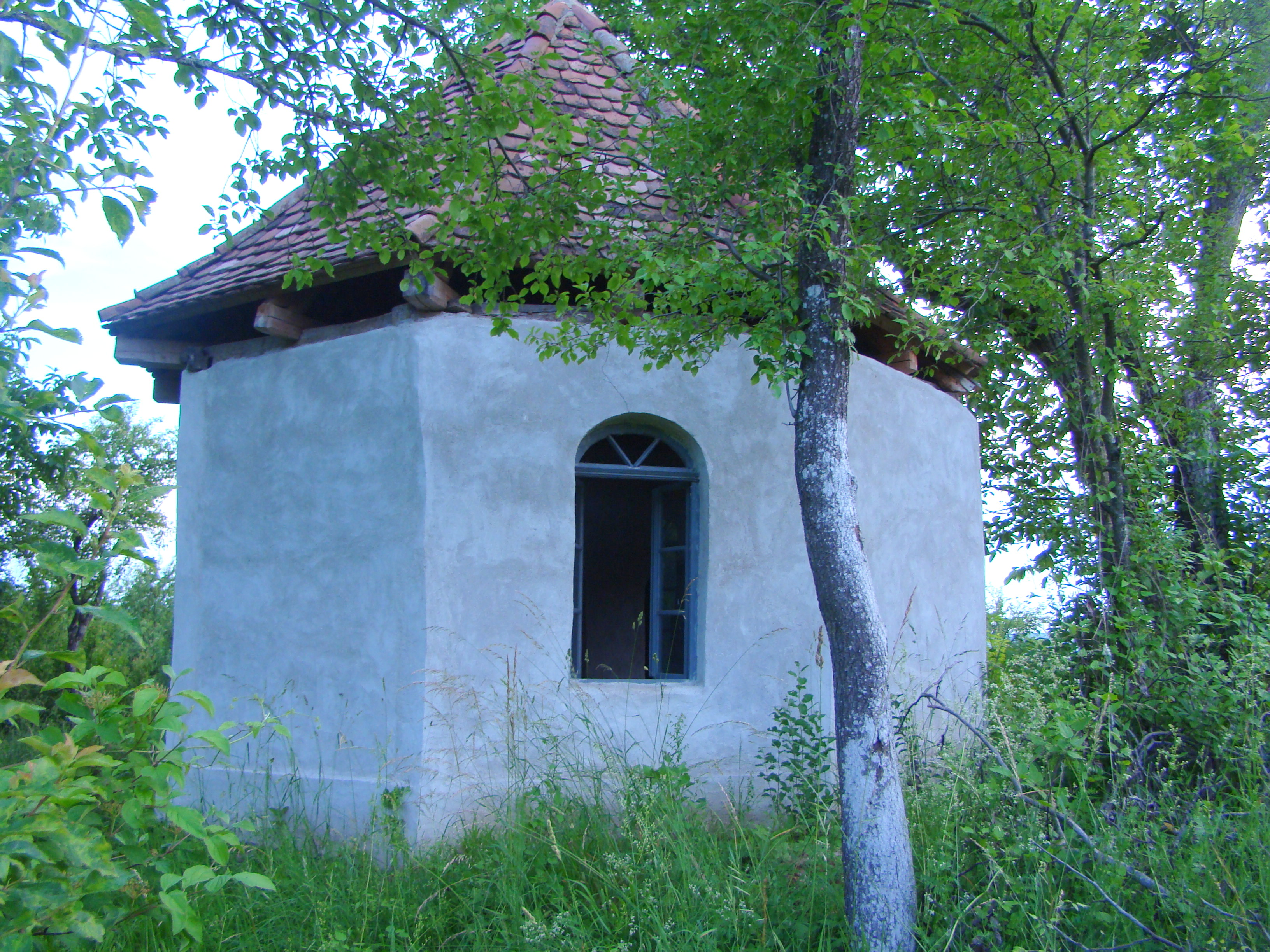 Biserica de lemn „Cuvioasa Paraschiva”, sat Grânari; comuna Jibert, str. Școlii, în cimitirul ortodox vechi sec. XVIII